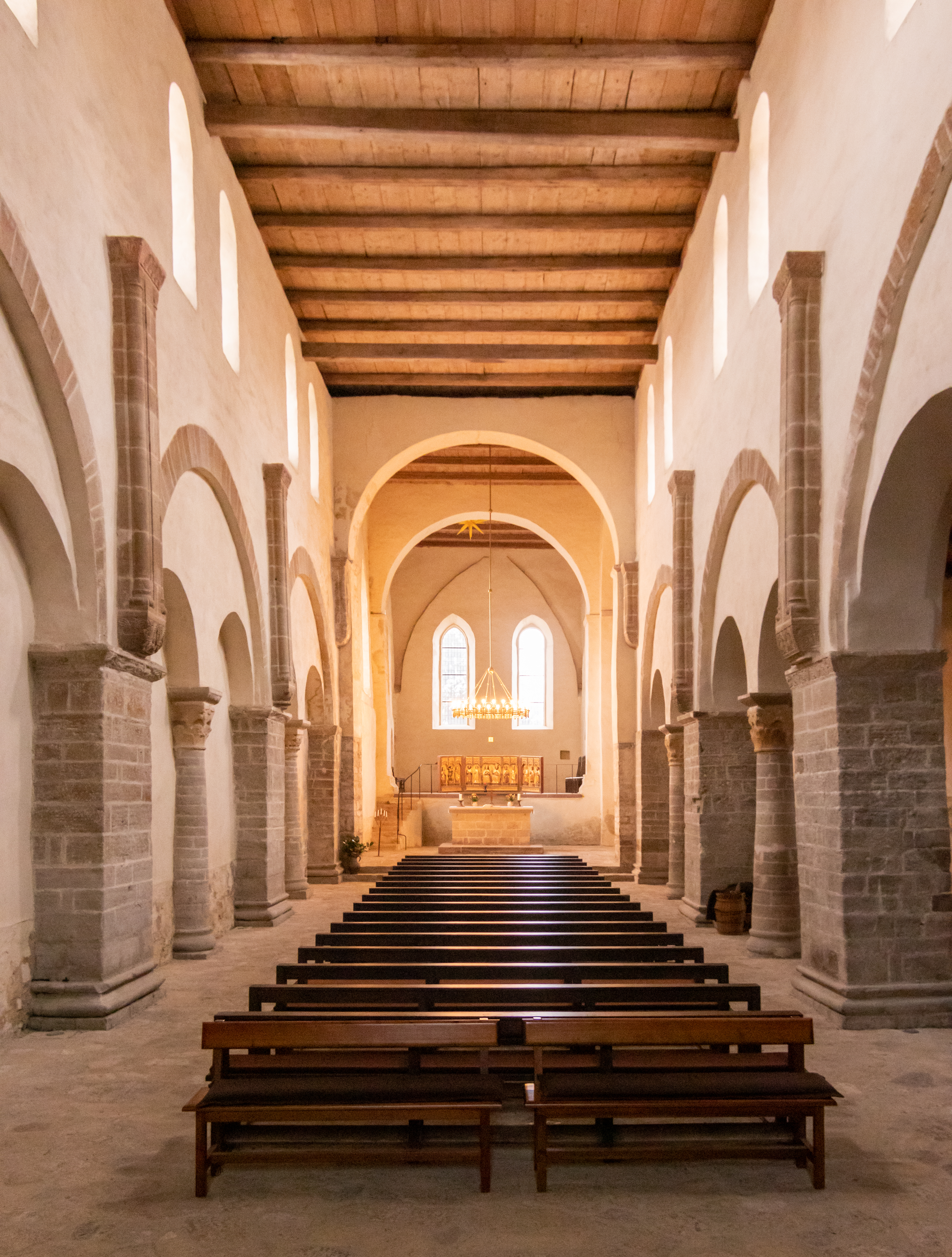 Drübeck, Klosterkirche, Innenansicht